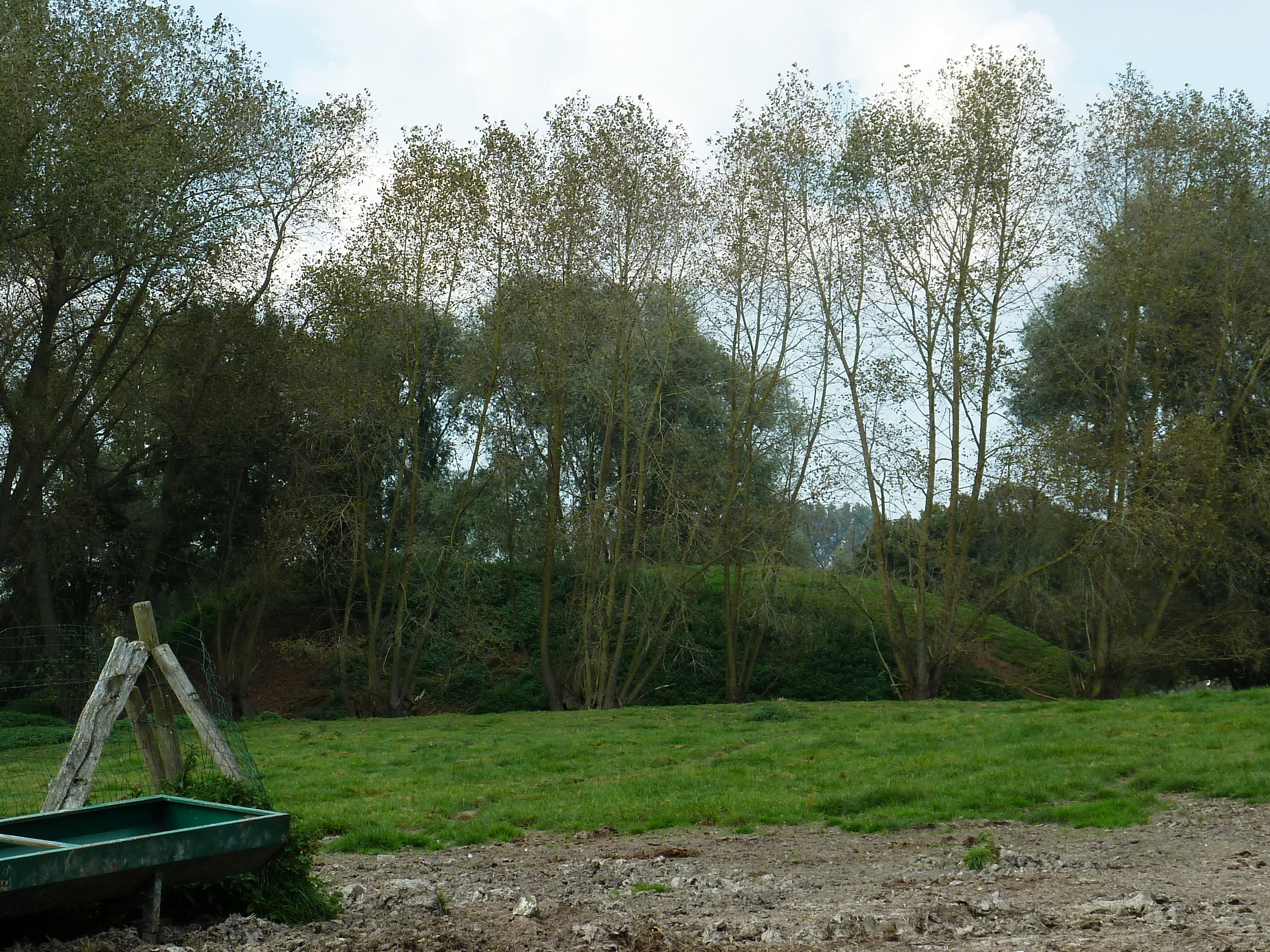 La Motte féodale Ochtezeele dans le Nord Nord-Pas-de-Calais.- France. .